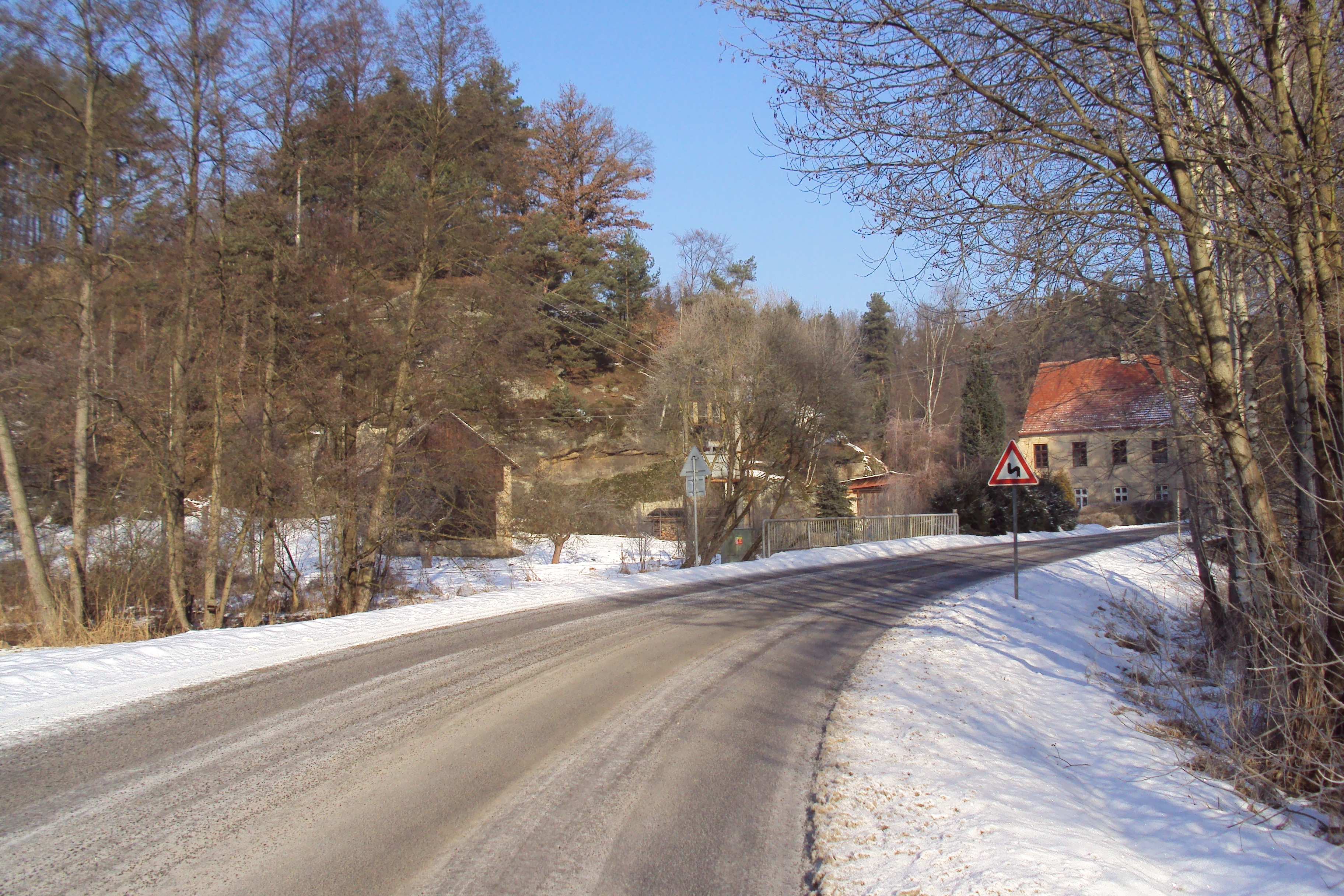 Rozprechtice jsou vesnička u Dubé